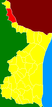 Localización de Guerrero en Tamaulipas